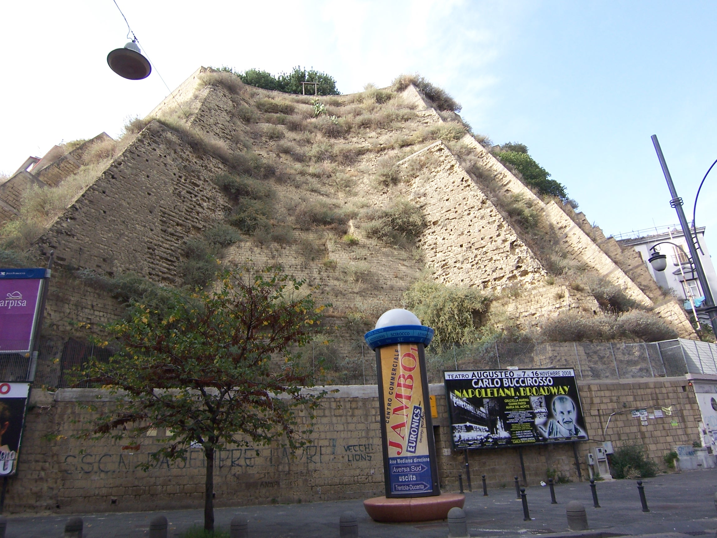 Monte Echia da via Santa Lucia.